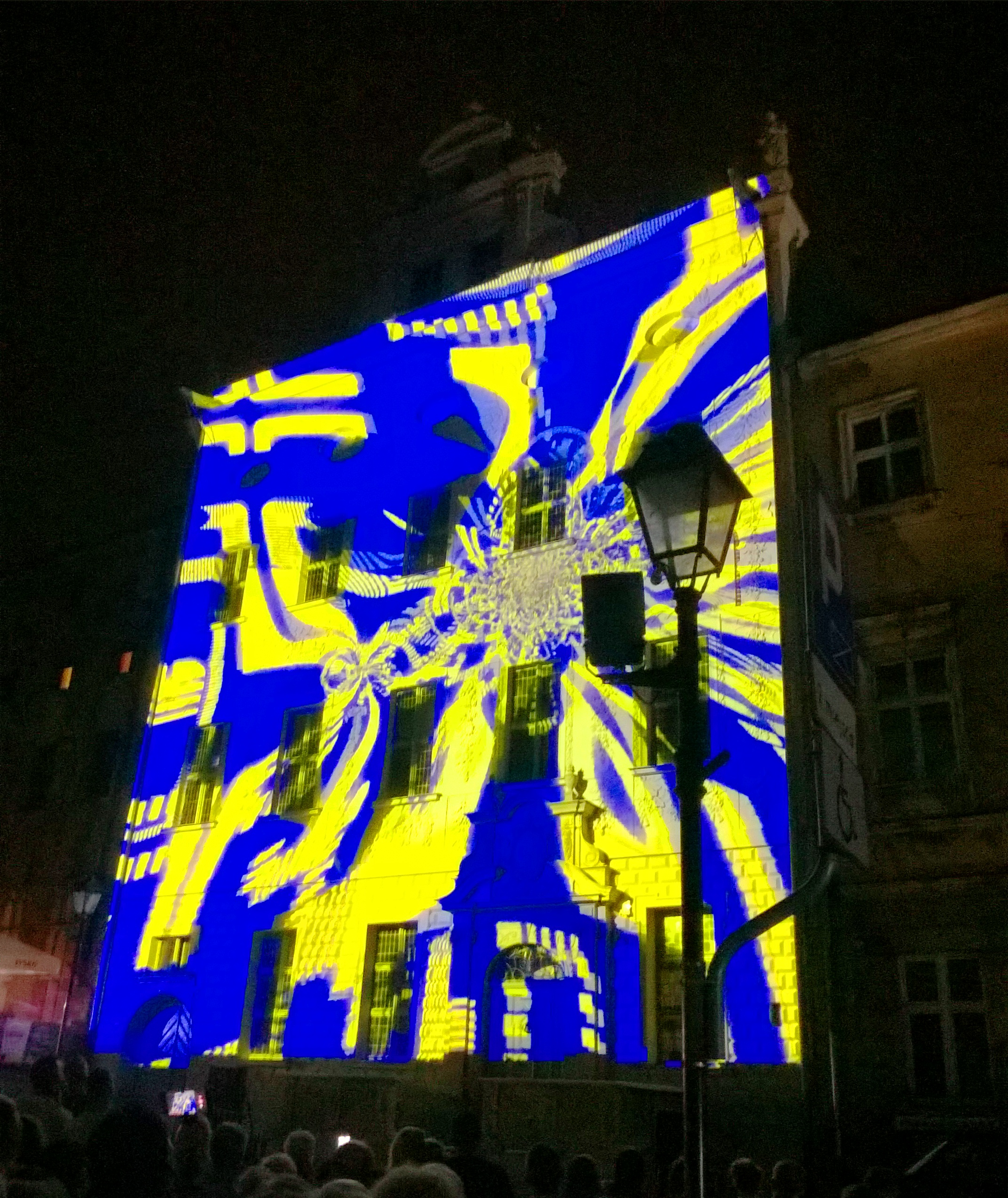 Bella Skyway Festival w3 Toruniu 2019